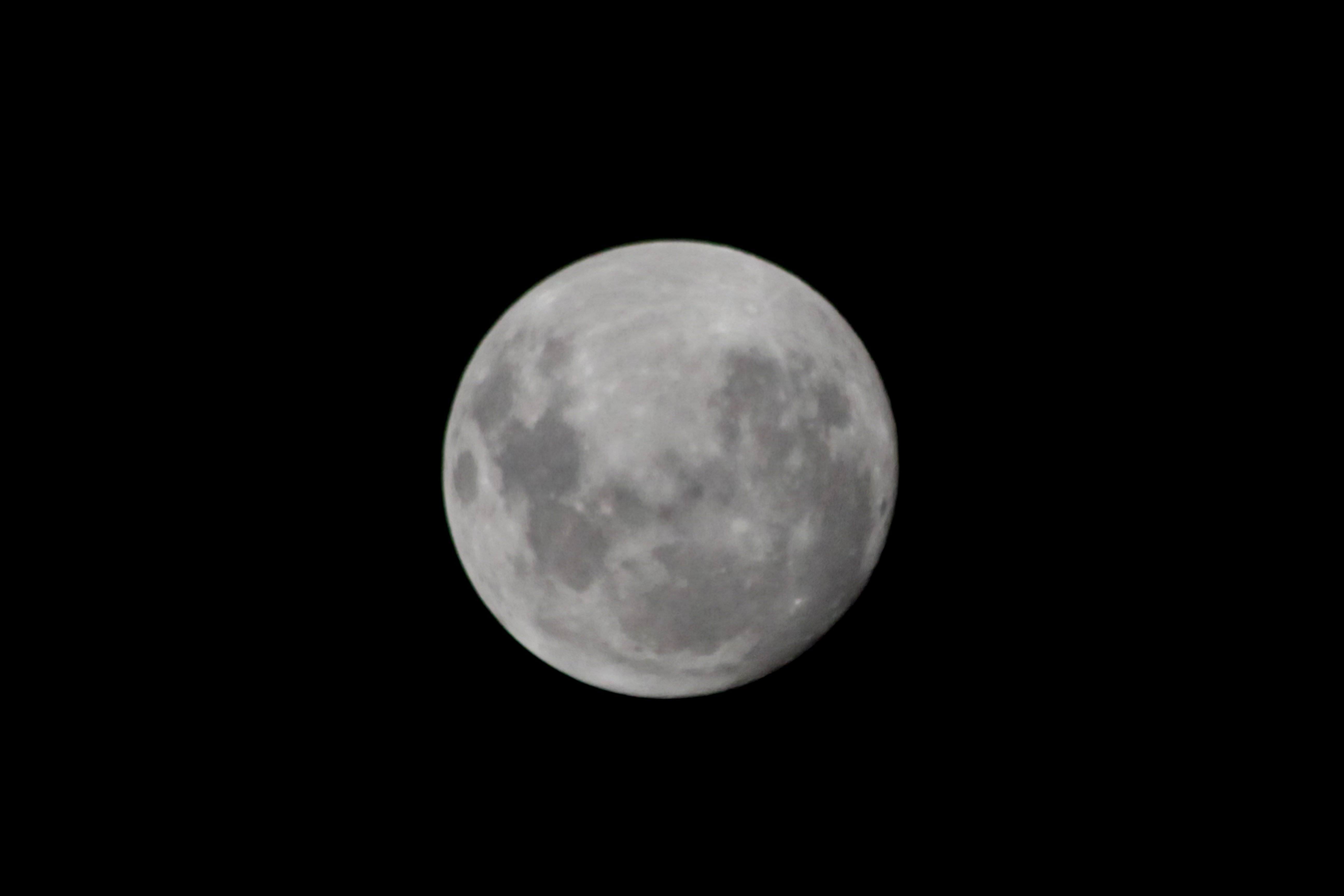 Lua cheia sobre o céu de São Paulo